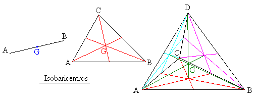 Figura realizada por M.Romero Schmidkte ✉, especialmente para la Enciclopedia Libre y para la Wikipedia.